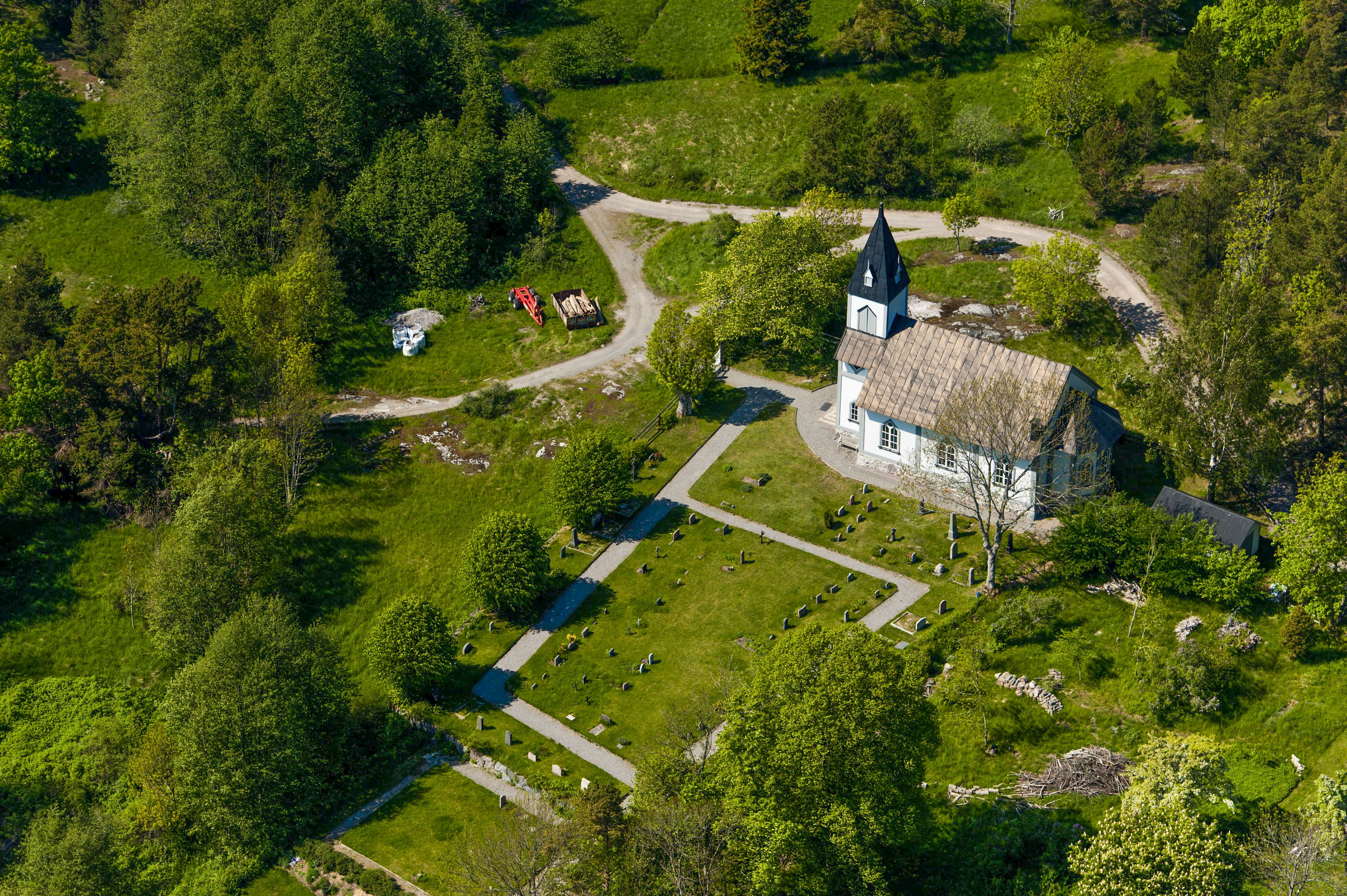 Nämdö ka